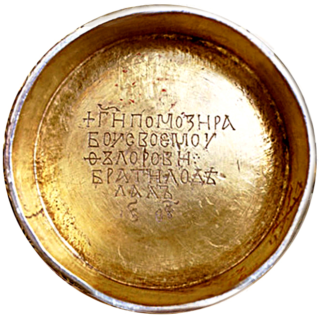 Изображение надписи на днище кратира Братилы (Фрола) из Софийского собора в Новгороде. Первая четверть XII в. Размеры: 21.5×20.5 см Нахождение: Новгородский государственный историко-архитектурный и худо­жест­вен­ный музей-заповедник.